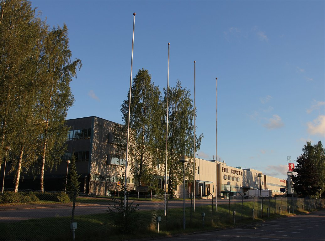 Pörssiyhtiö Saga Fur Oyj:n toimitaloa (Fur Center) Vantaan Varistossa. Vuonna 1978 valmistuneen rakennuksen on suunnitellut arkkitehti Osmo Mikkonen. Yhtiön pääkonttorin pääsisäänkäynti ja huutokauppasalin sisältävä osa rakennuksesta eivät näy kuvassa, vaan jäävät jäävät kuva-alan vasemmalle puolelle (olivat osin puiden takana).